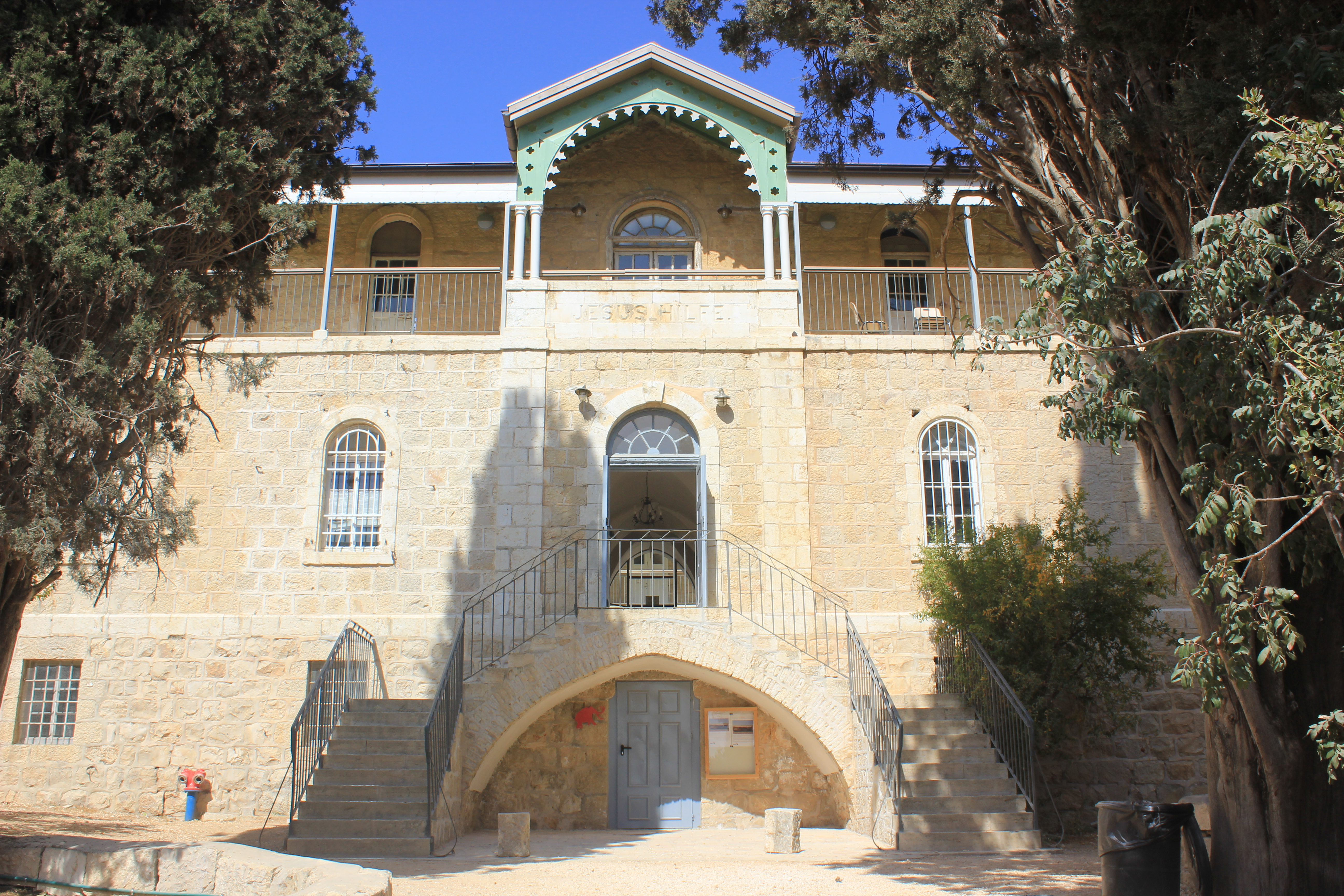 בית החולים הממשלתי ע"ש הנסן (בעבר בית החולים למצורעים עזרת ישו) היה מרכז טיפולי לחולים במחלת הנסן (צרעת) בשכונת טלביה. עד 2002 פעל כמרפאת חוץ, ושיכן את המרכז הארצי למחלת הנסן של משרד הבריאות. במקום מוזיאון על היסטוריית בתי החולים בירושלים.